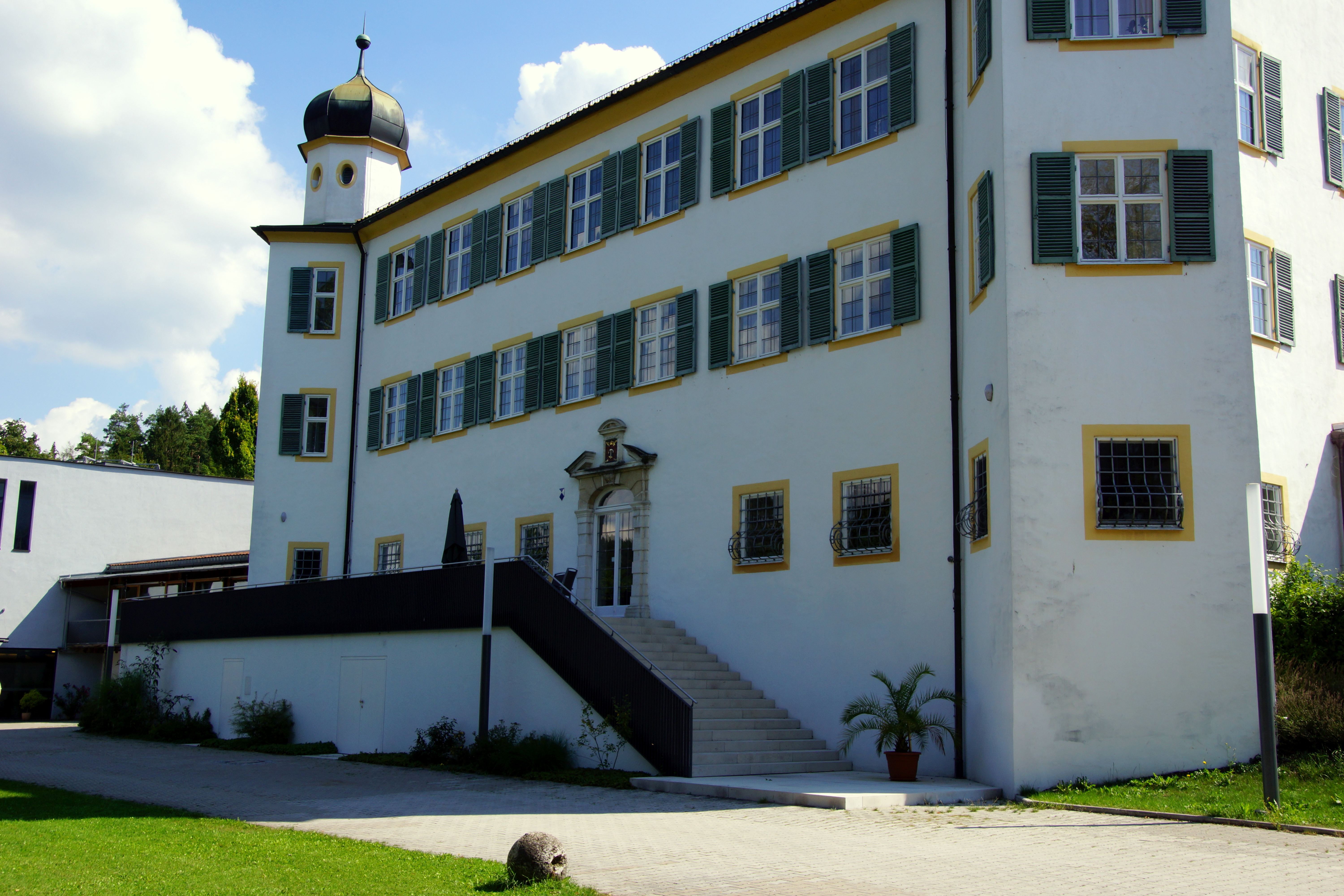 Das ehemalige Schloss wird gegenwärtig als Jugendhaus der Diözese Eichstätt genutzt